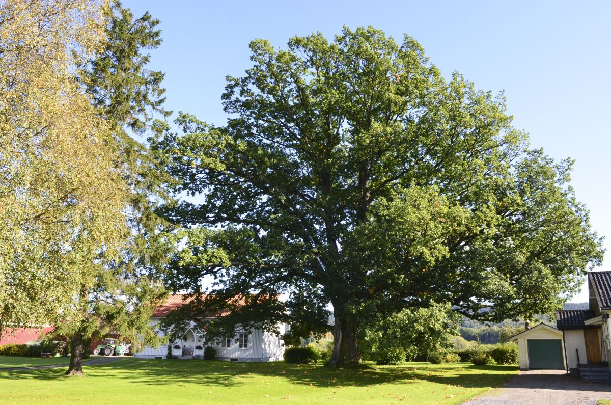 Gunnestadeika ble fredet i 1954.